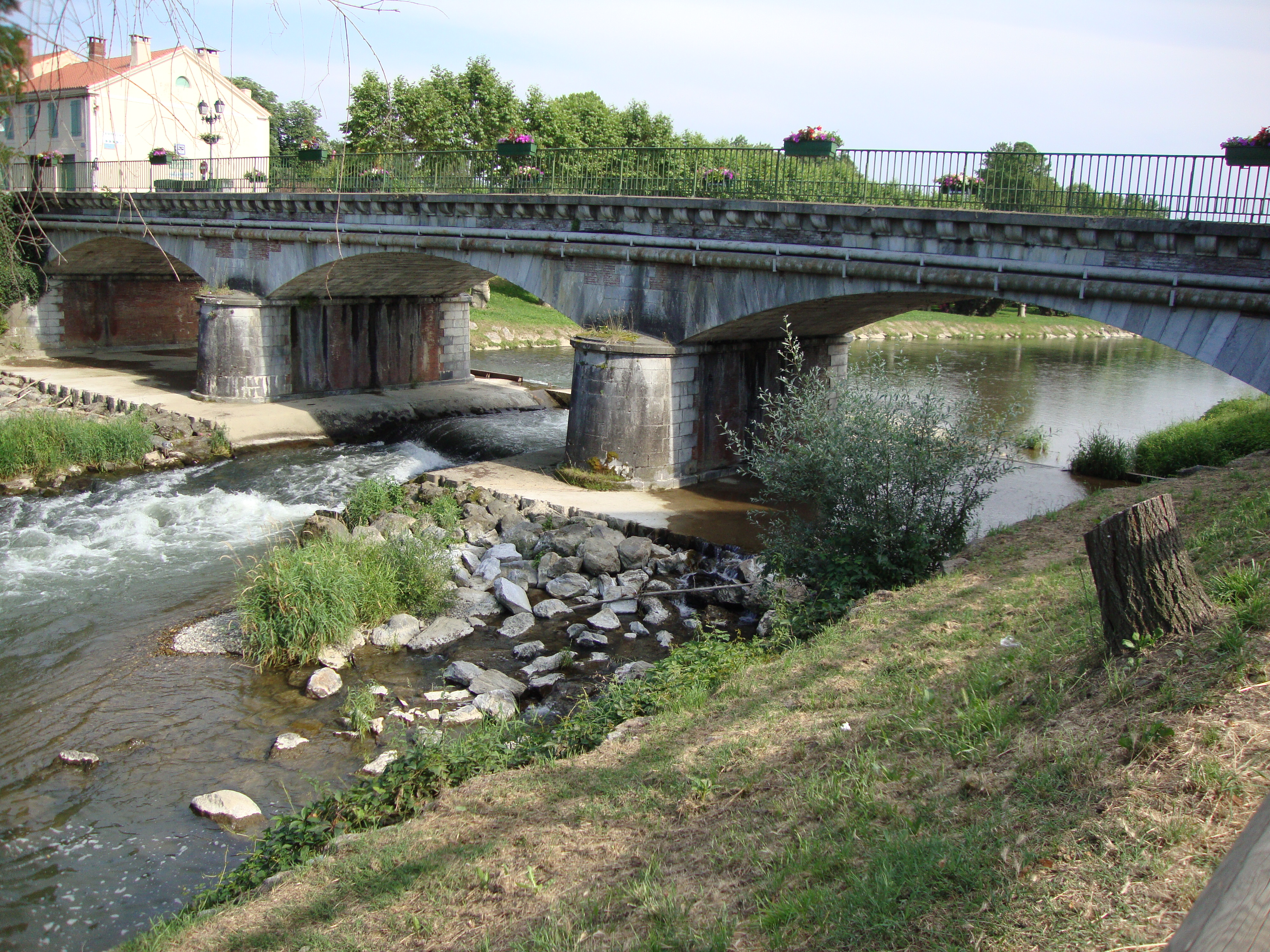 Maubourguet (Hautes-Pyr, Fr) pont sur l'Échez